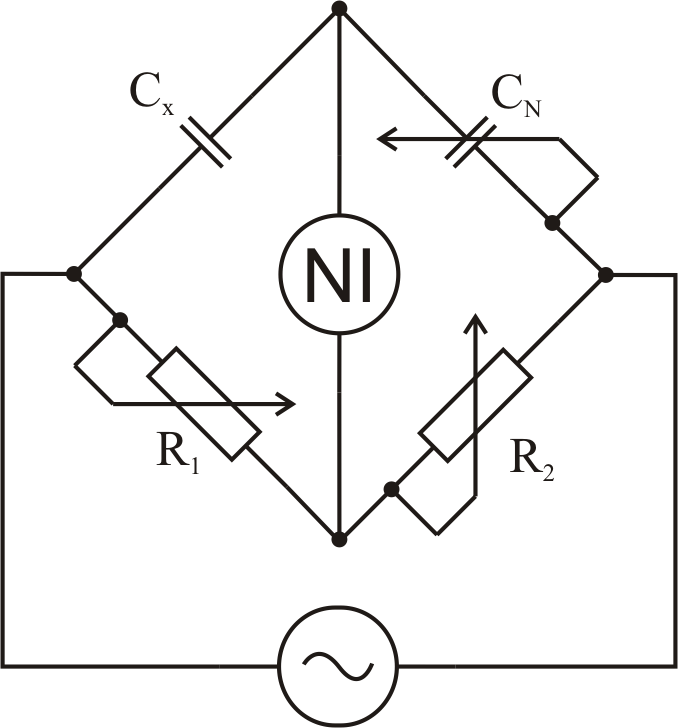 De Sautyho měřící můstek